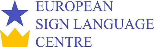 The logotype for European signlanguage centre